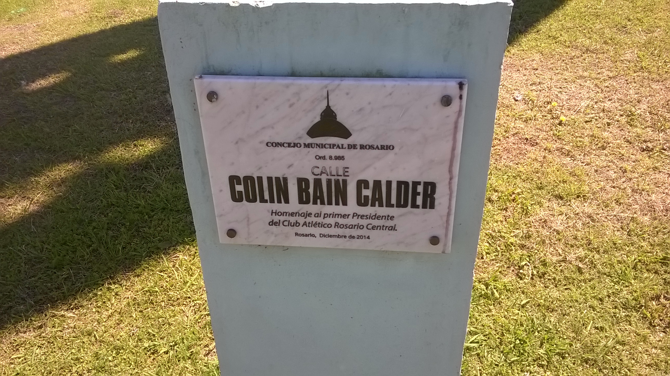 Placa identificatoria de la calle Colin Bain Calder al inicio de la misma, que homenajea a quien fuera el primer presidente del Club Atlético Rosario Central, entre 1989 y 1900. Se encuentra emplazada en el Parque Alem, dando inicio en la Avenida Arturo Frondizi al 400.